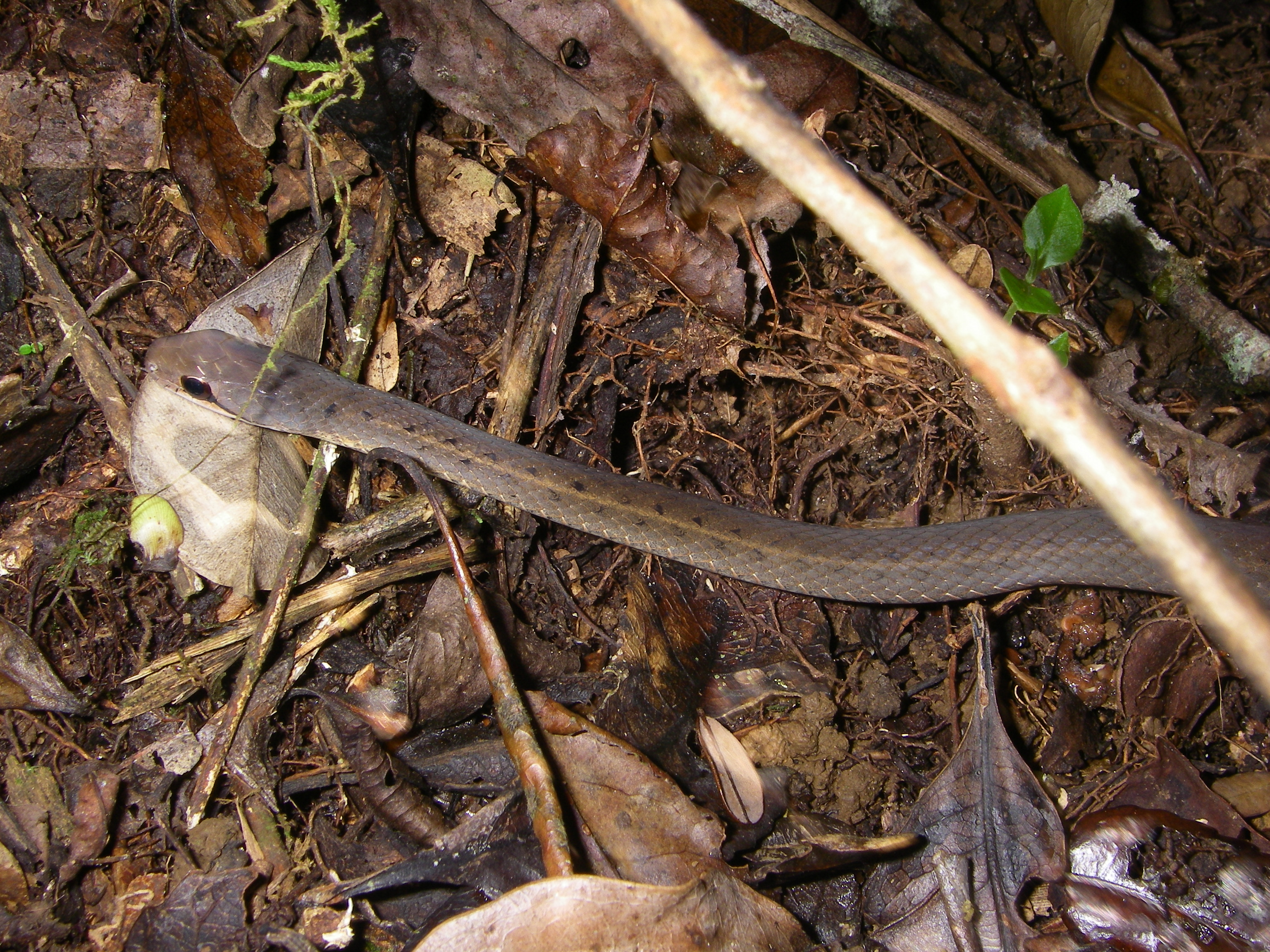 Liophidium torquatum; Piste E 100, Ranomafana National Park, Madagaskar